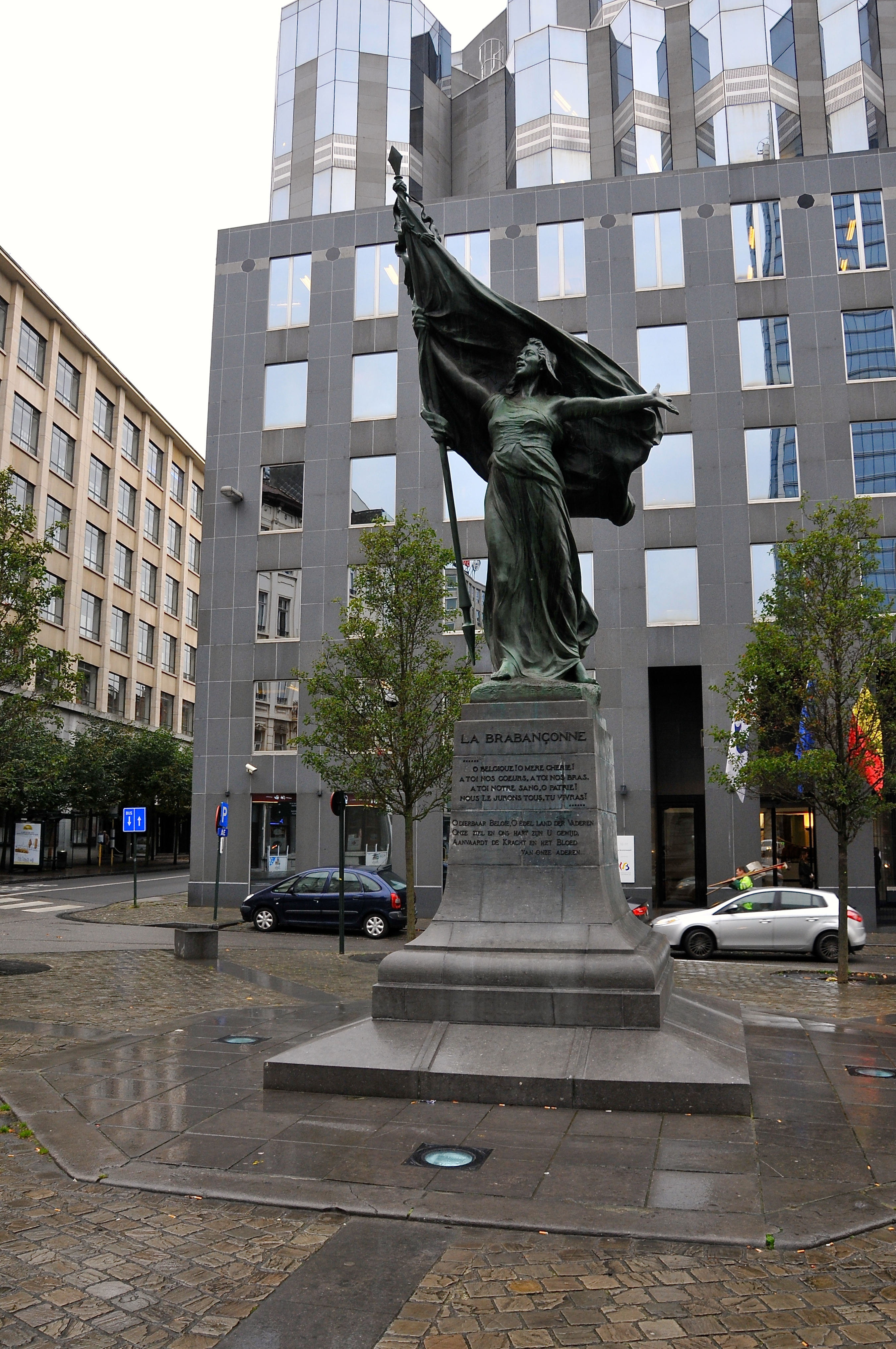 Volkslied van Belgie. Rechtover het Madouplein in Brussel vind je het Surlet de Chokierplein (genoemd naar debaron die als voorlopig regent in 1831 het eerste Belgische staatshoofd werd) waar een standbeeld staat van een vrouw die de Belgische vlag draagt (de Belgische versie van de Marianne). De vrouw verzinnebeeldt de provincie Brabant. Op de sokkel vind je in de drie officiële landstalen de eerste drie alinea’s van de Brabançonne terug. Voor meer info